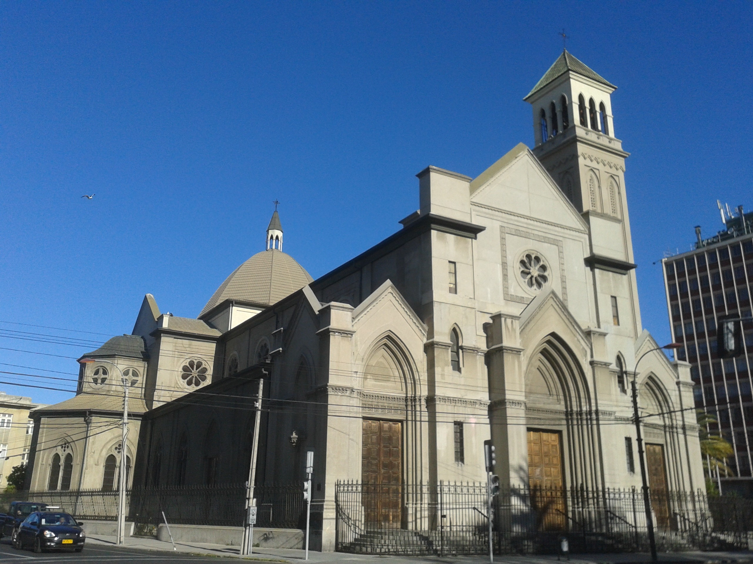 Catedral de Valparaíso This is a photo of a national monument in Chile: 577